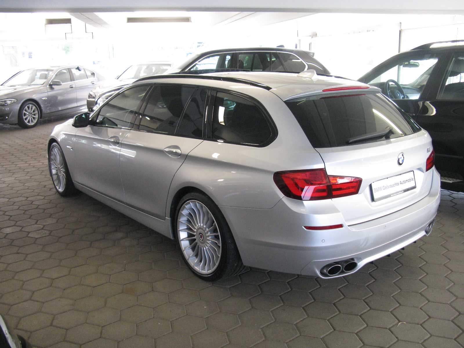 BMW Alpina B5 Touring F11